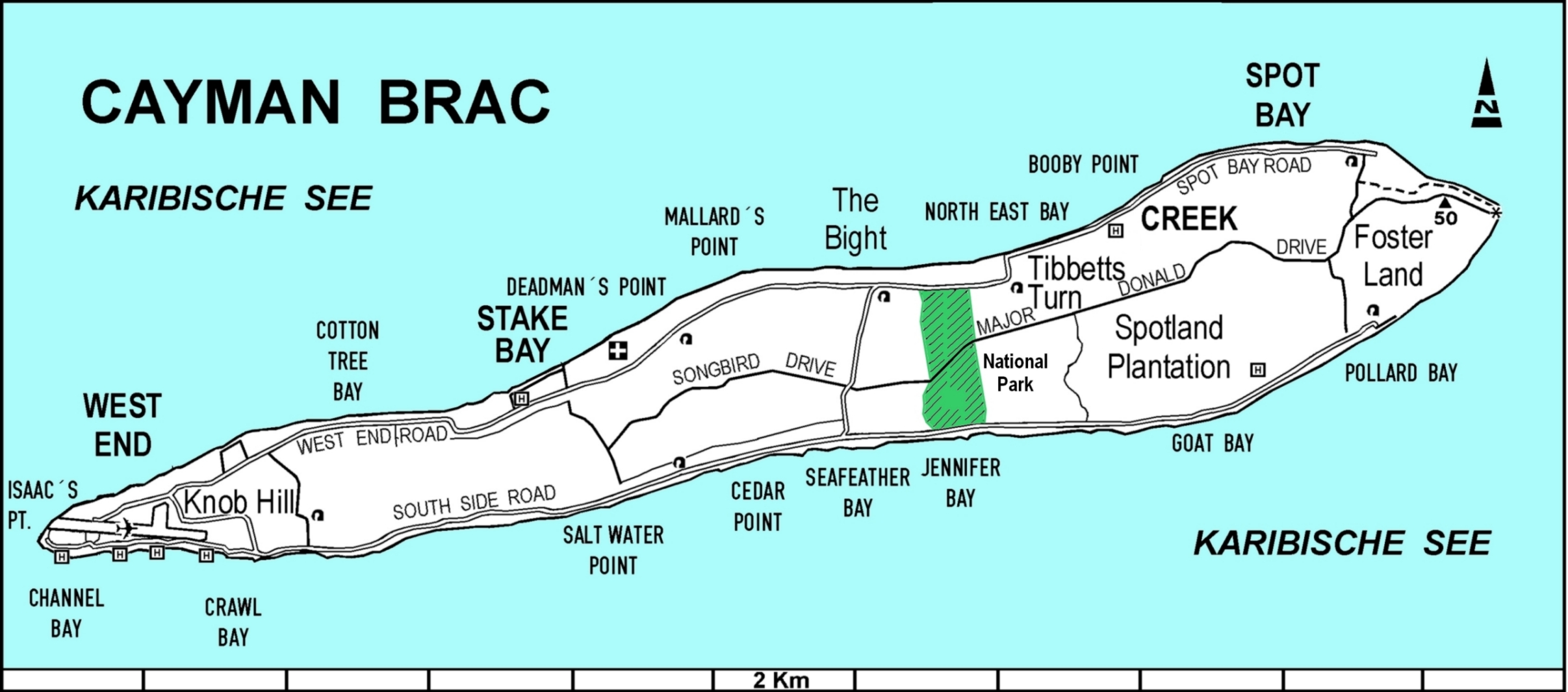 Karte der Insel Cayman Brac